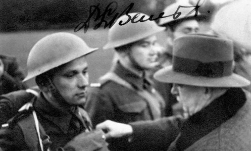 Эдвард Бенеш награждает Йозефа Габчика и Яна Кубиша (фото 1940 года)